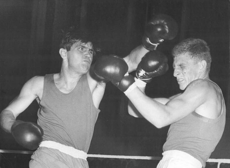 Karpati, Brauske Zentralbild Semeniuk 18.9.1963 Internationales Boxturnier in Berlin eröffnet Mit 13 Begegnungen begann am 17.9.1963 in der Berliner Dynamo-Sporthalle ein internationales Gewichtsklassenturnier im Boxen der SV Dynamo, an dem insgesamt 51 Faustkämpfer aus Polen, der UdSSR, Ungarn, der CSSR, Bulgarien und der DDR teilnehmen. UBz: Punktsieger über den Ungarn Karpati (links) wurde Brauske (DDR) durch Abbruch in der dritten Runde.